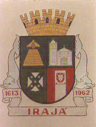 Brasão de Irajá - Rio de Janeiro